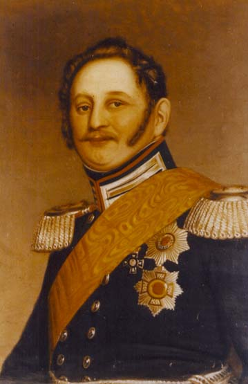 Constantin von Hohenzollern-Hechingen